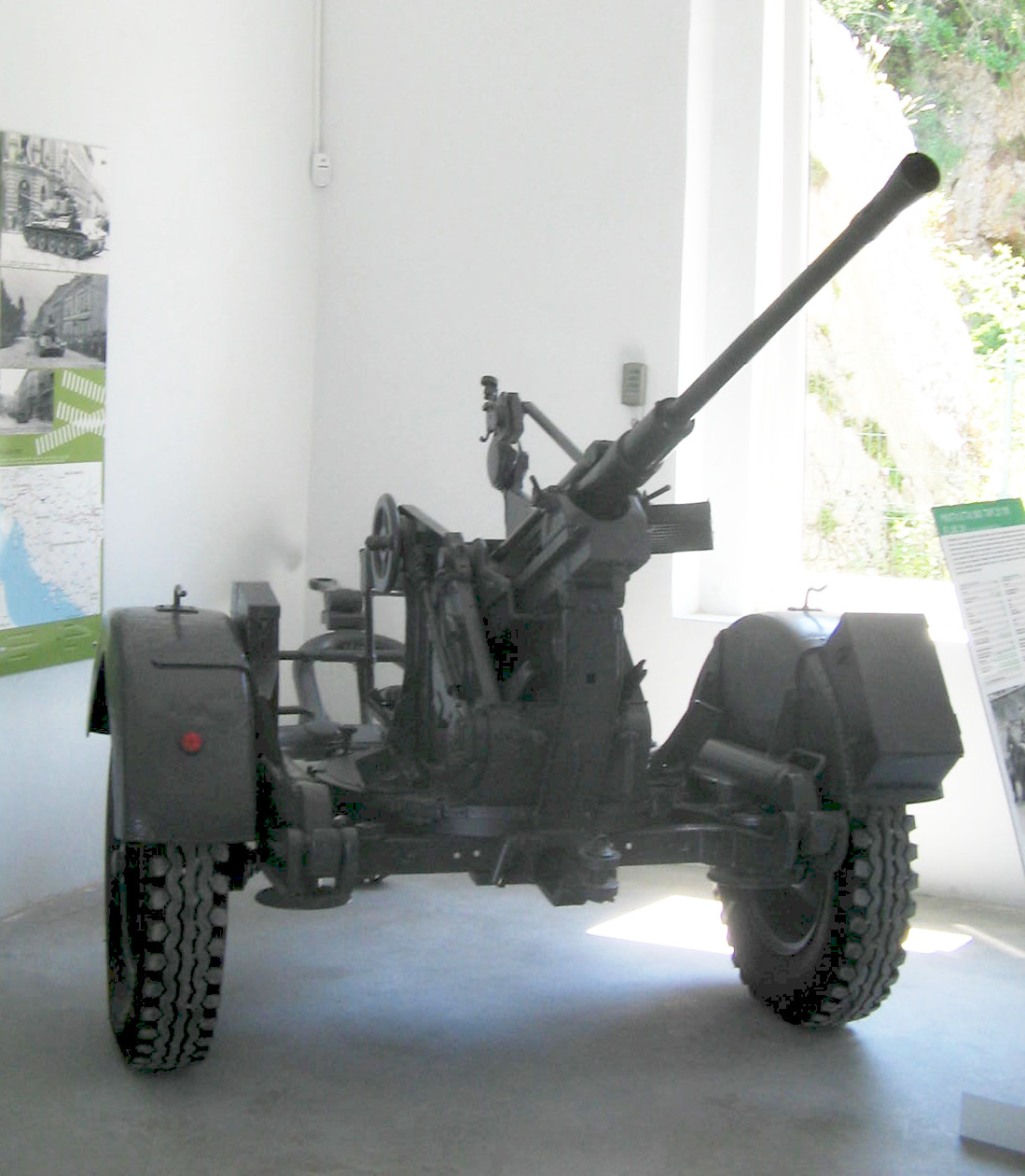 Park of Military History, Pivka, Slovenija